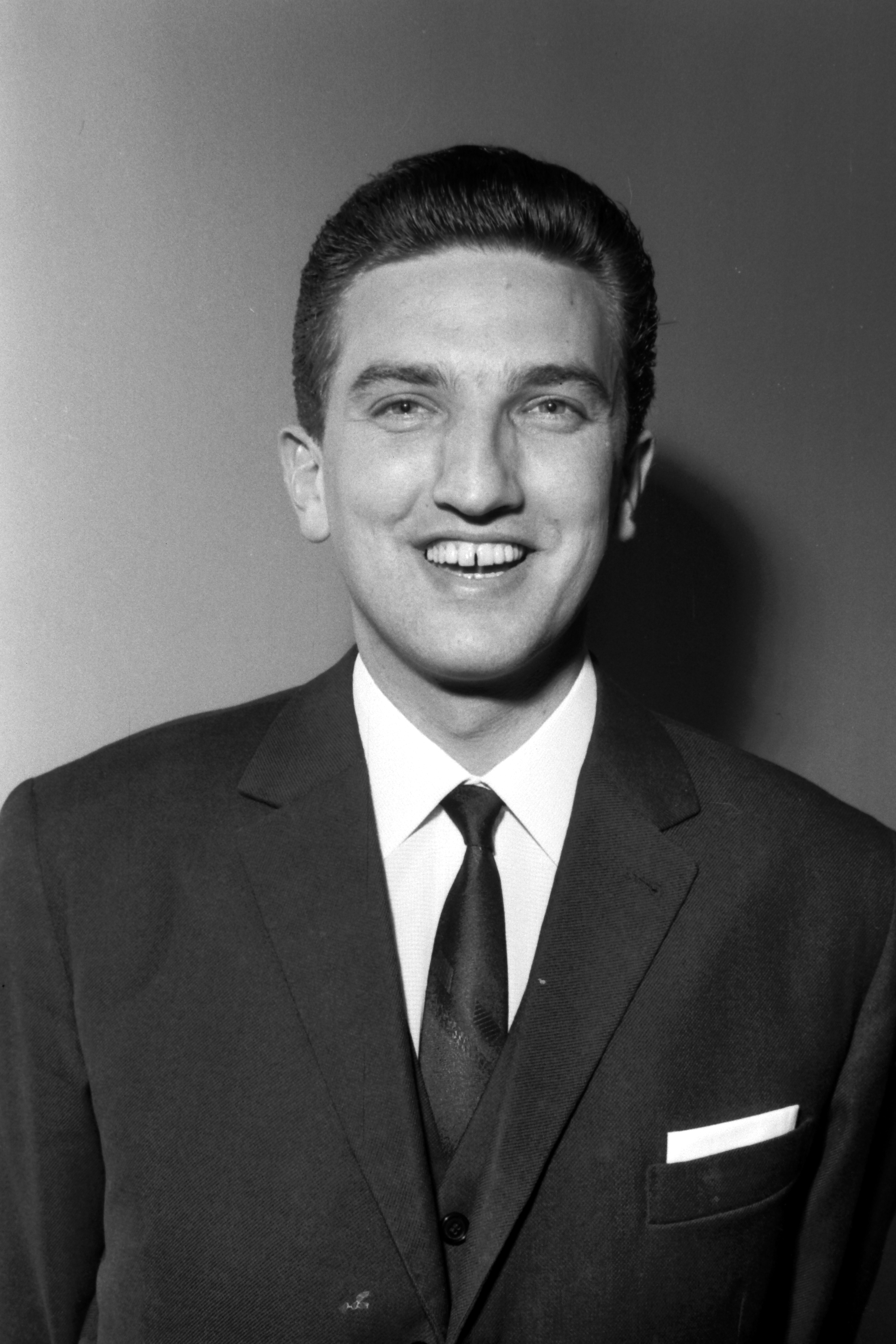 Vice Vukov (1936—2008), hrvatski pevač i političar, 1964. godine